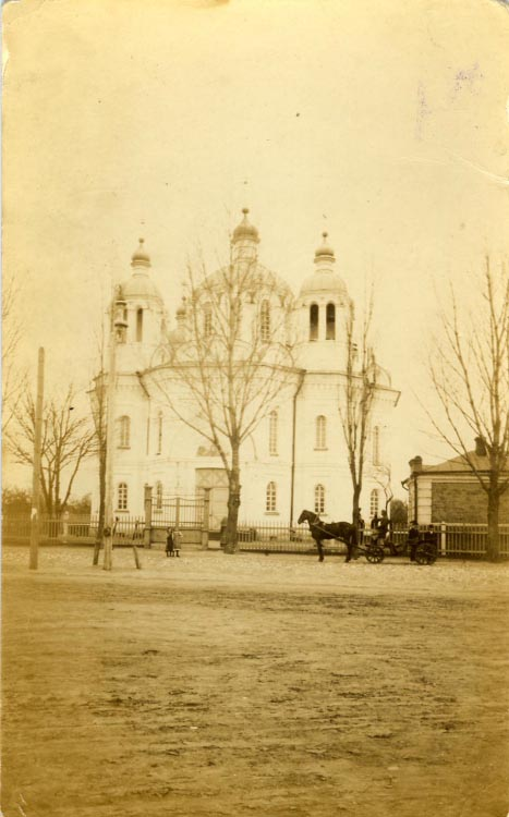 Беларуская (тарашкевіца): Рагачоў (Rahačoŭ), пляц Рынак (plac Rynak). Саборная царква-мураўёўка